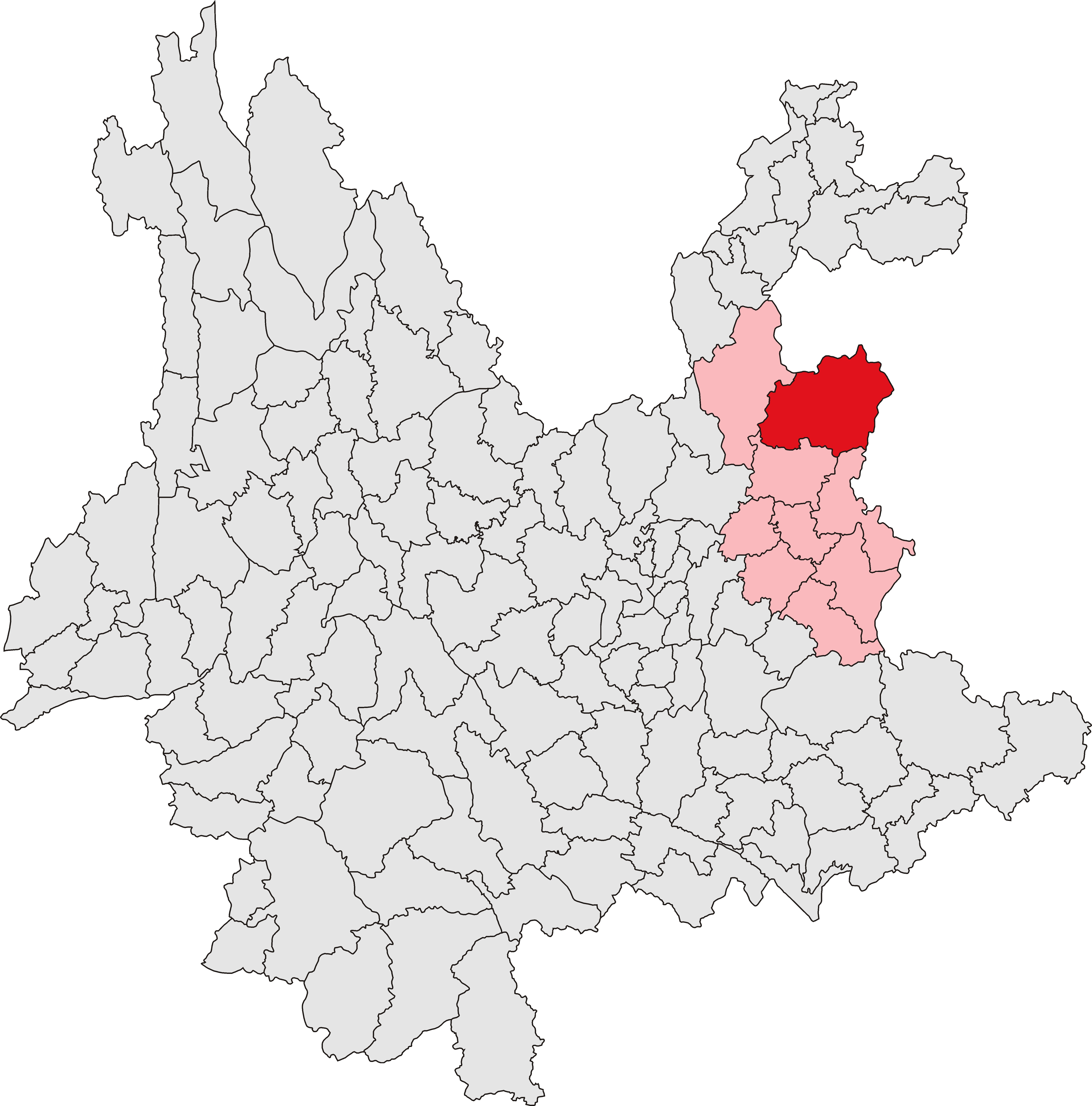 中文（中国大陆）: 宣威市位置图